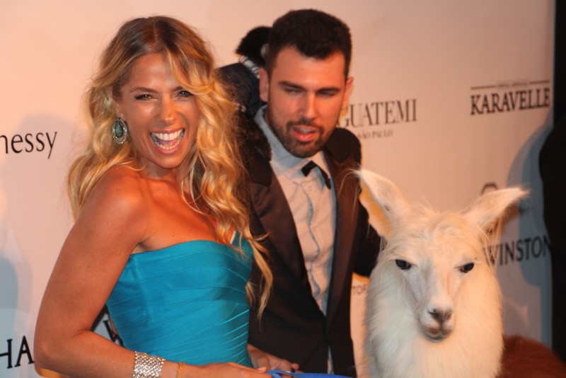 3 - Adriane Galisteu-002